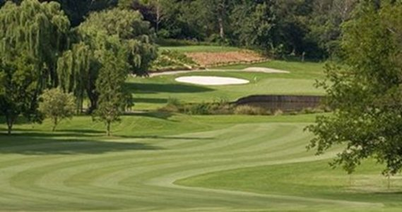 Royal Johannesburg & Kensington Golf Club, hole 11 van de Oostbaan